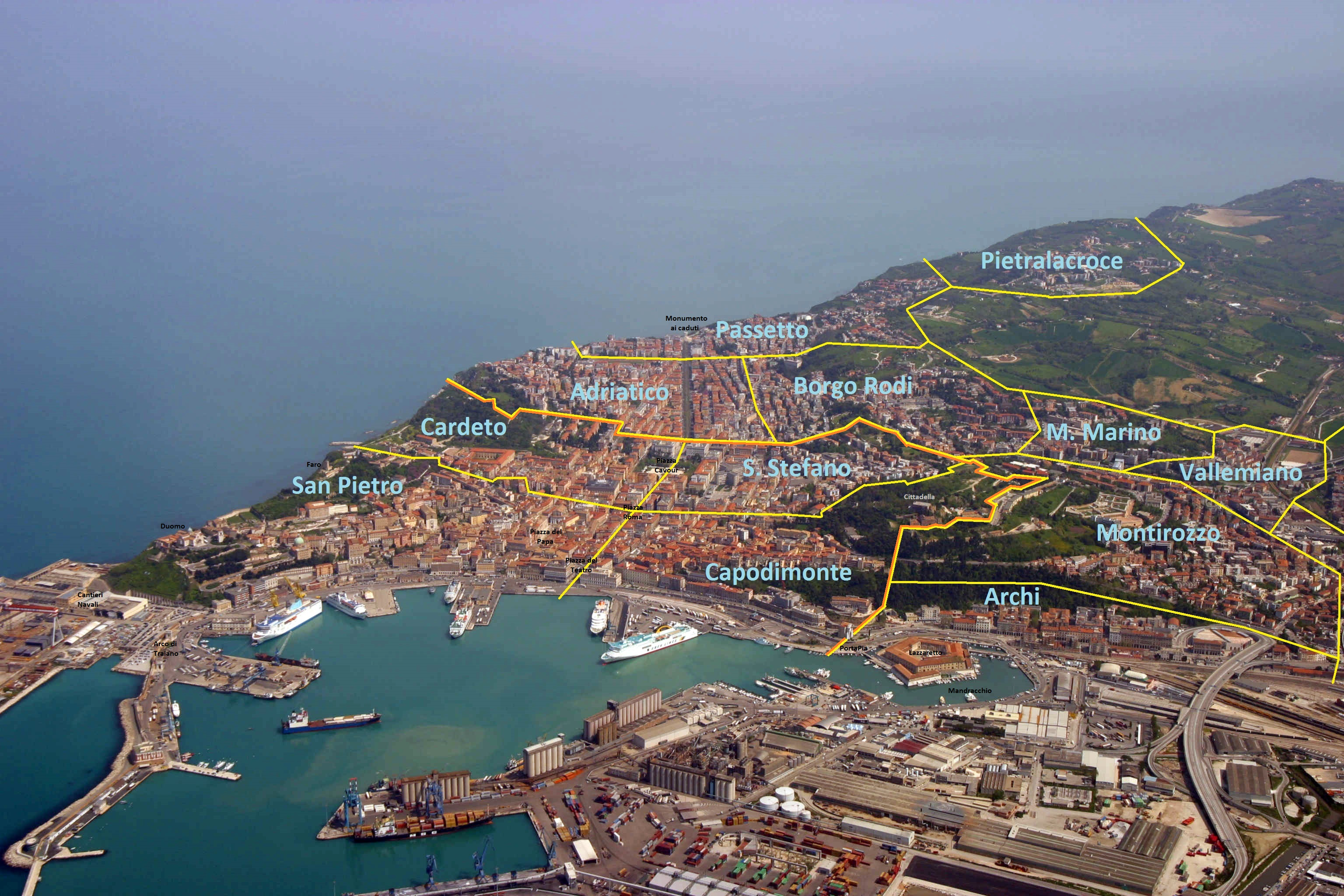 Panorama aereo di Ancona con sovrapposizione dei nomi dei rioni